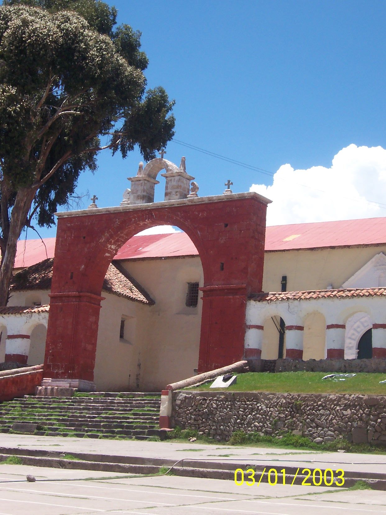 Entrada principal a una de las iglesias de Chucuito.